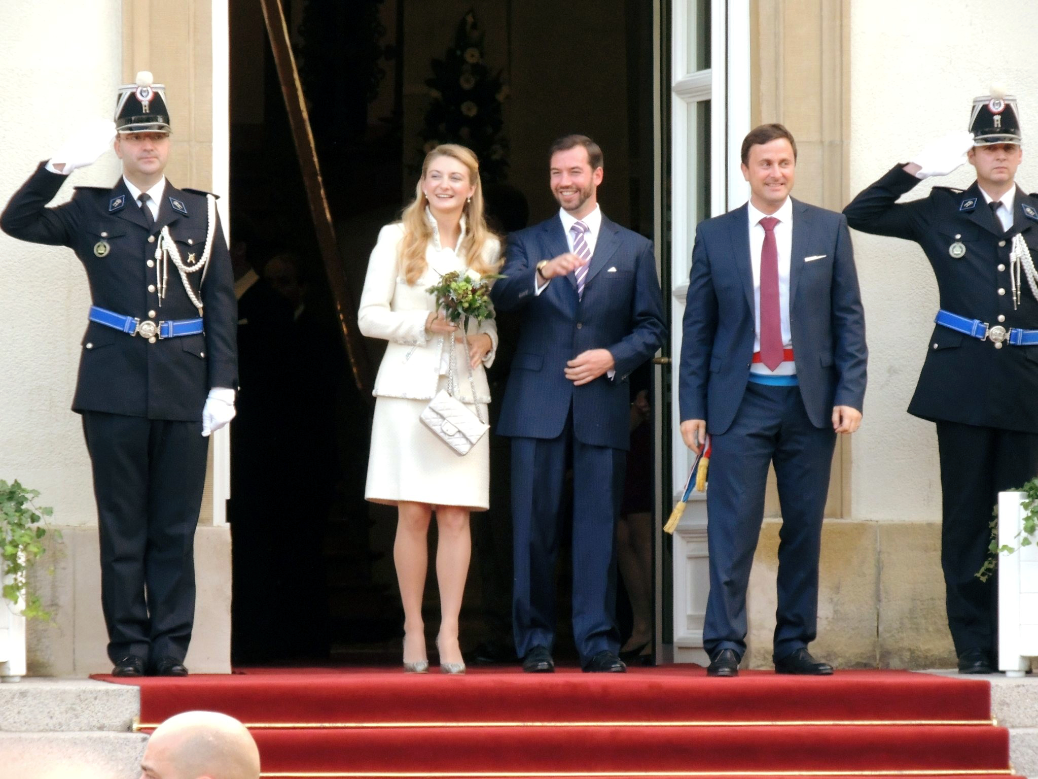 No hirem zivile Bestietnes verloossen den Ierfgroussherzog Guillaume an d'Stéphanie vu Lëtzebuerg d'Stater Märei.